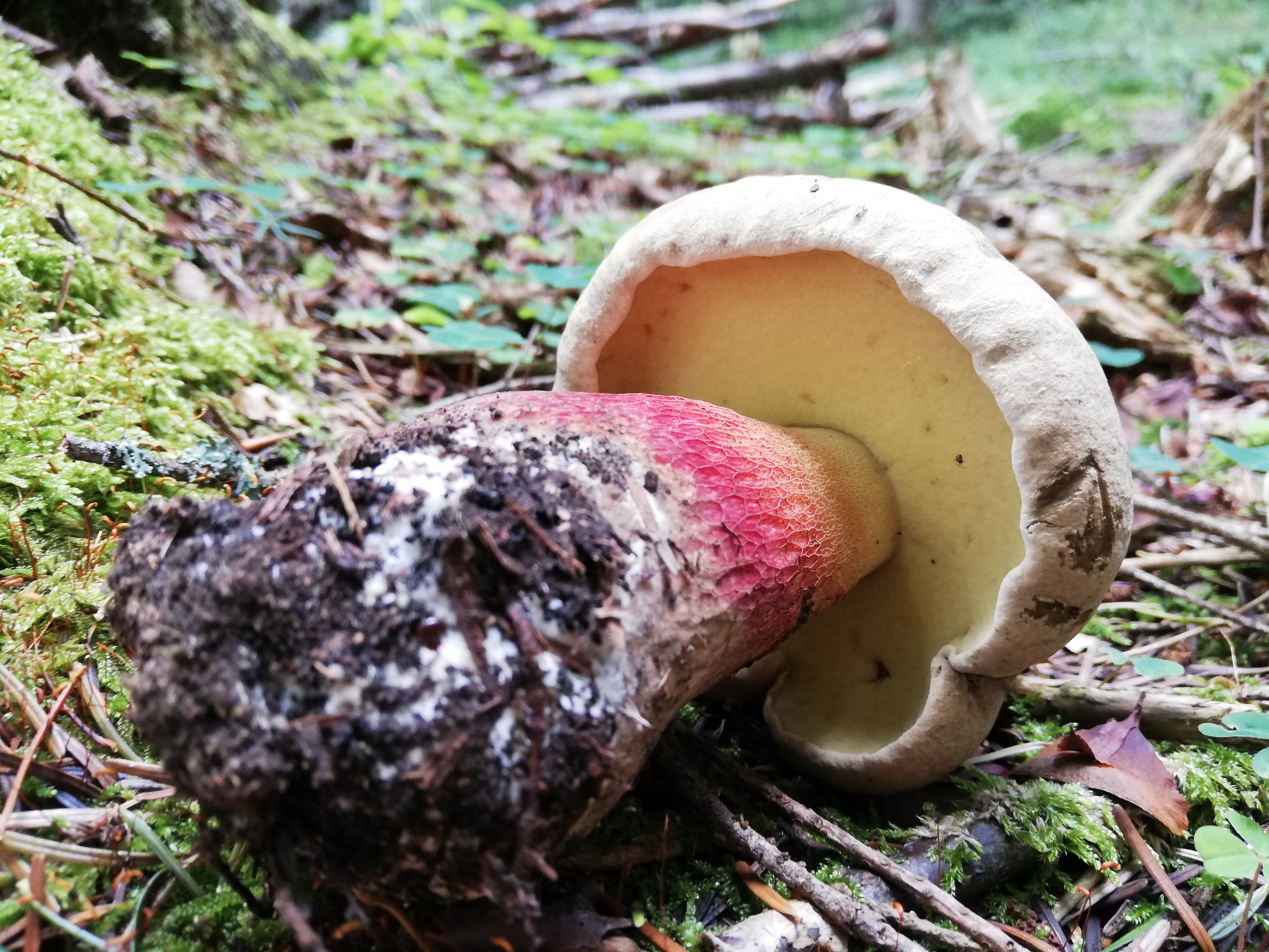 Owocnik z widocznym hymenoforem i powierzchnią trzonu